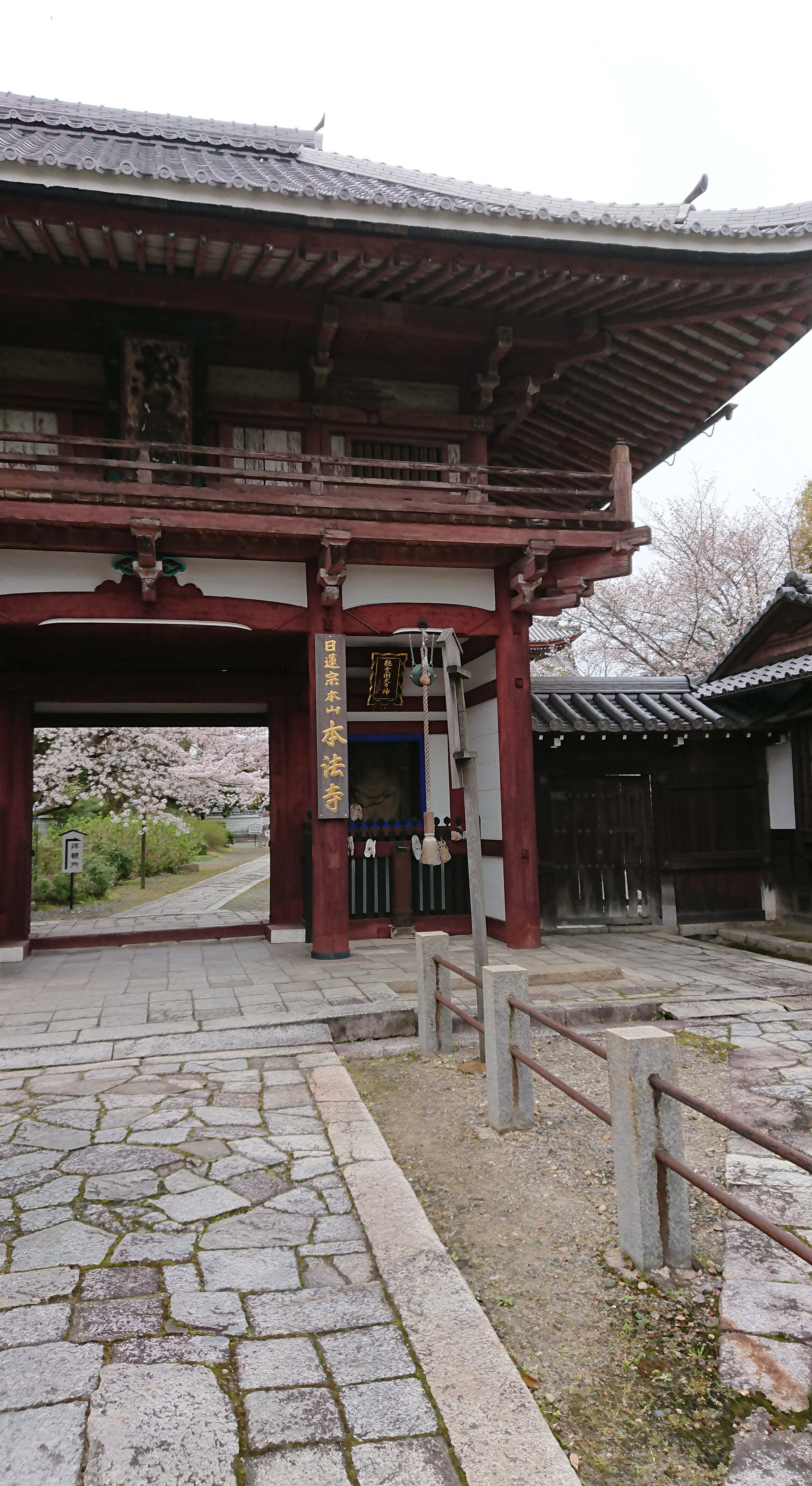 本法寺(京都)山門